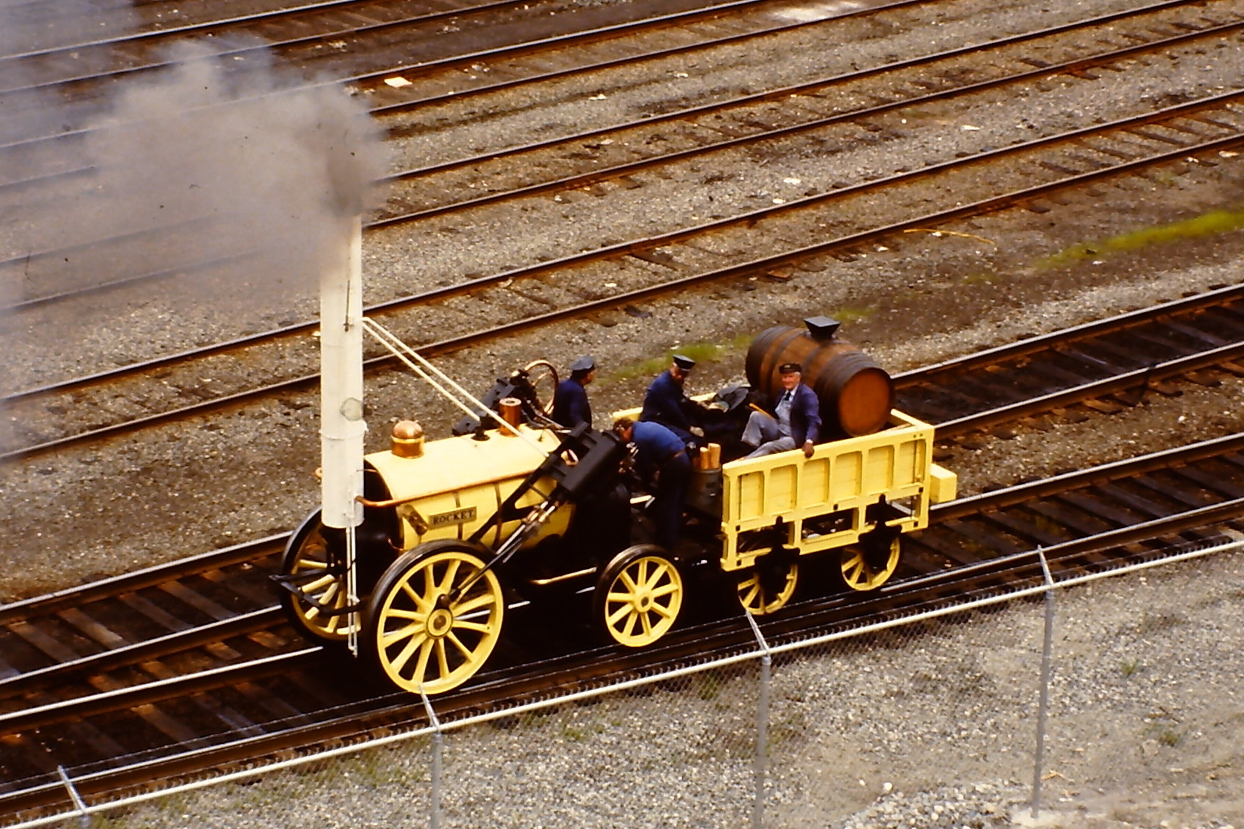 Dampflokomotive Rocket (Replikat) auf der SteamExpo 86